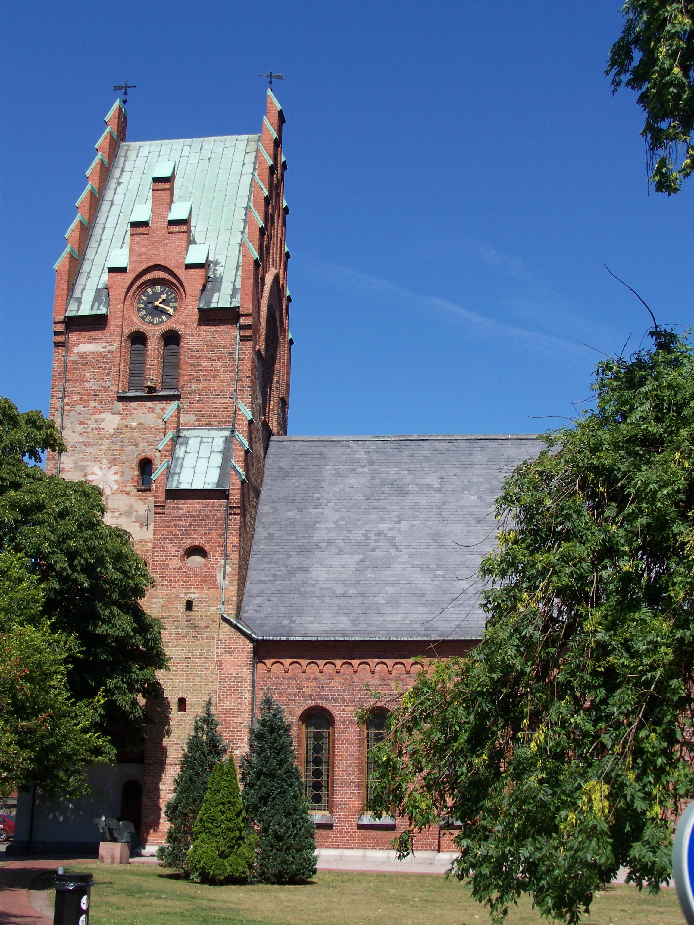 Trelleborg, St.-Nicolai-Kirche (Sankt Nicolai kyrka)